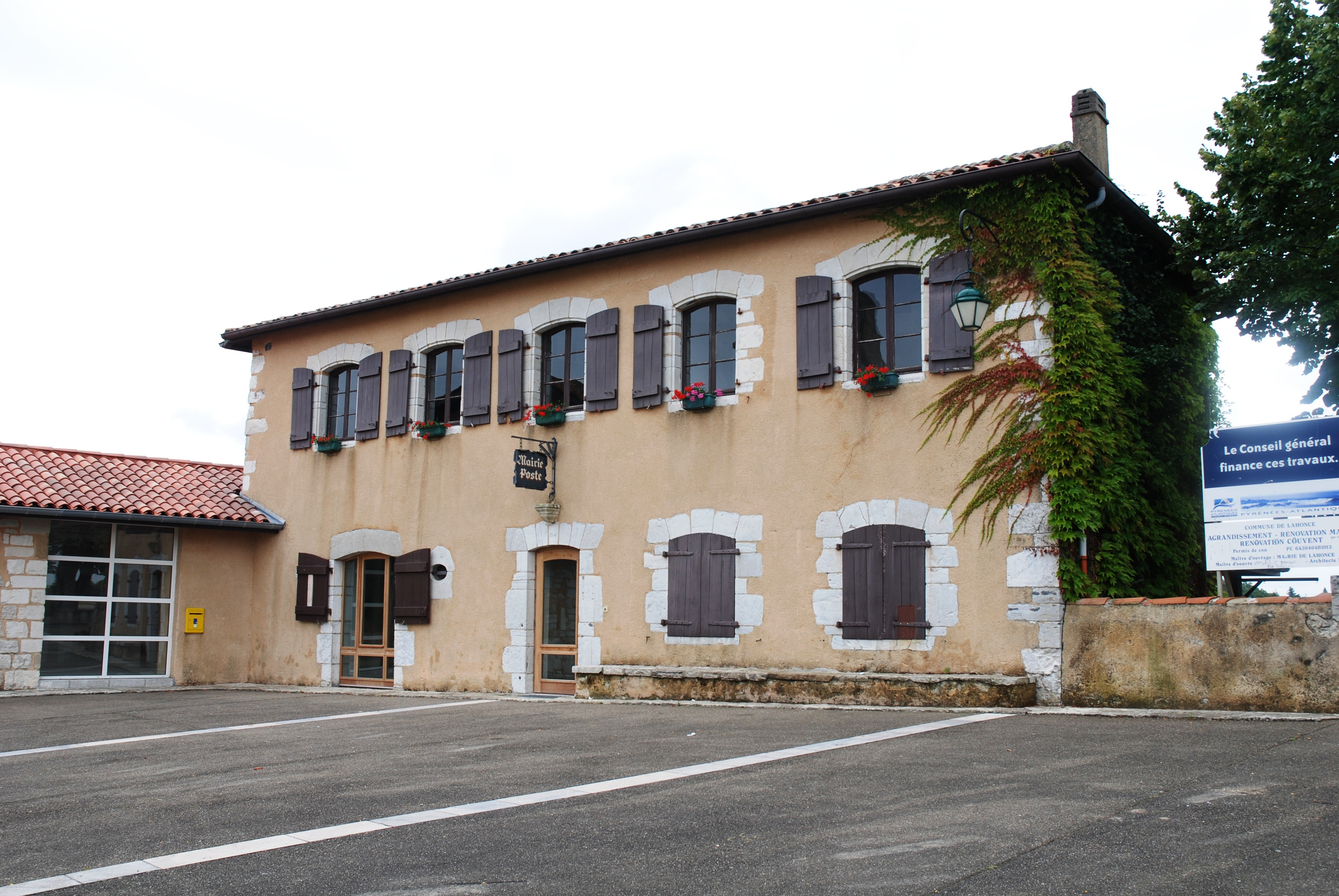 Lahonce, la mairie, qui fait partie de l'ensemble constitué par l'abbaye de chanoines de Prémontré, actuellement église paroissiale de l'Assomption-de-la-Bienheureuse-Vierge-Marie et mairie.